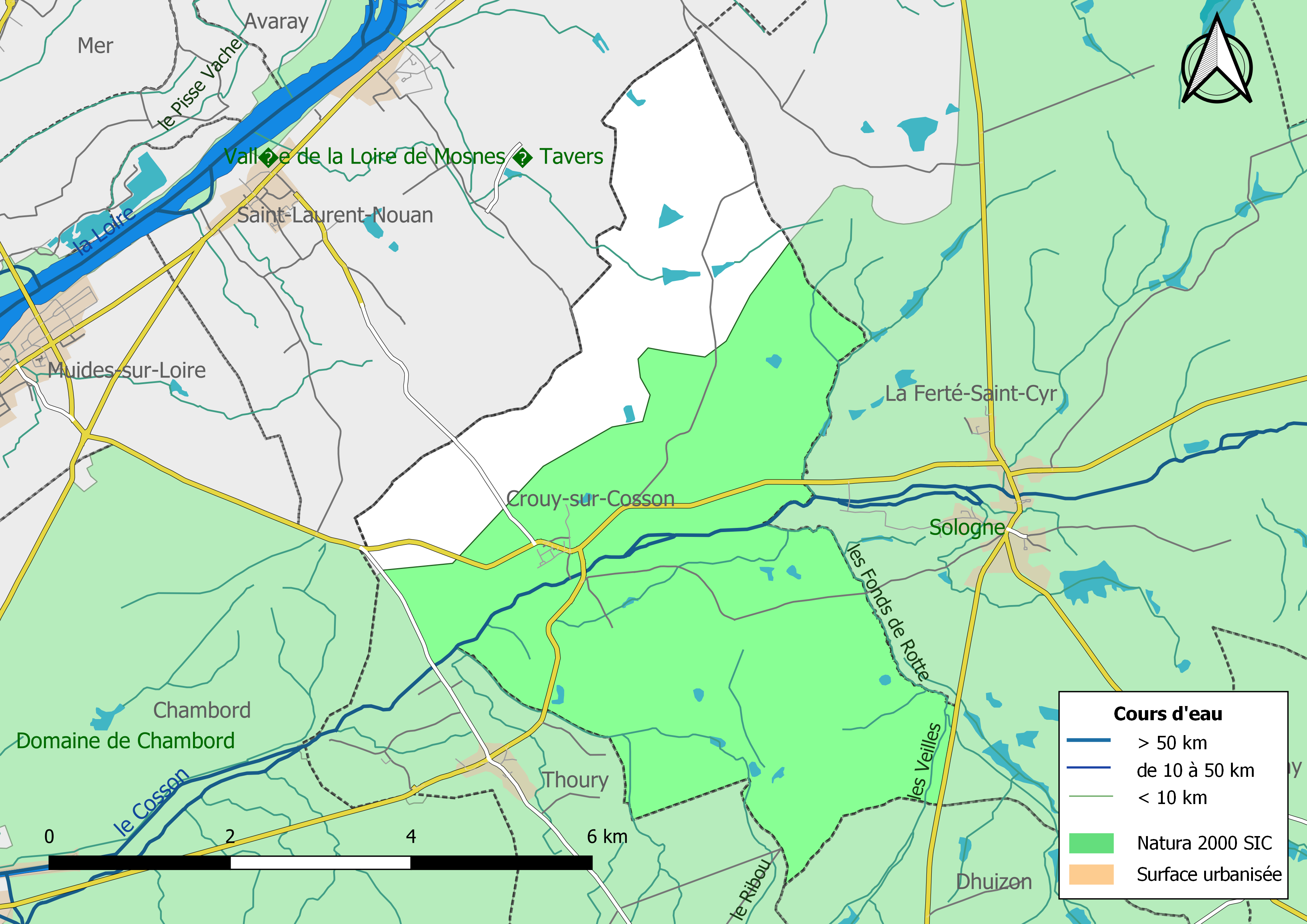 Zones Natura 2000 de type SIC de la commune de Crouy-sur-Cosson (Loir-et-Cher, France).